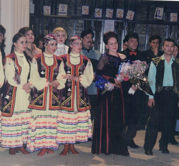 Аҙнабаева Зилә Рамаҙан ҡыҙы Башҡортостан Республикаһының атҡаҙанған мәҙәниәт хеҙмәткәре коллективы менән